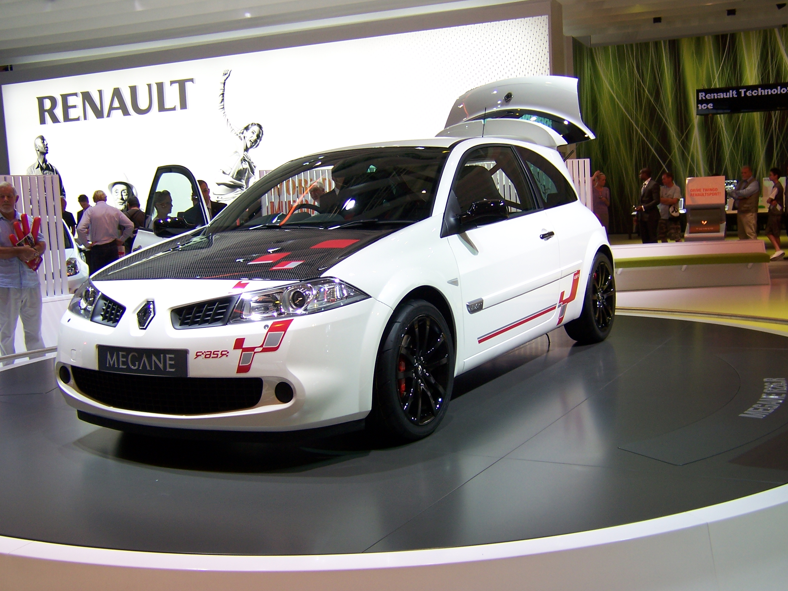 Renault Megane R26R